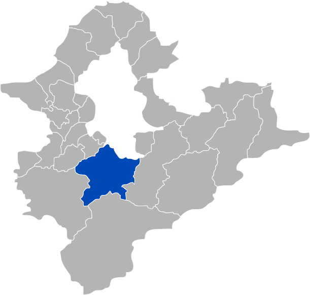 KaurJmeb為編寫臺灣省臺北縣新店市，於2005年1月23日所繪製。